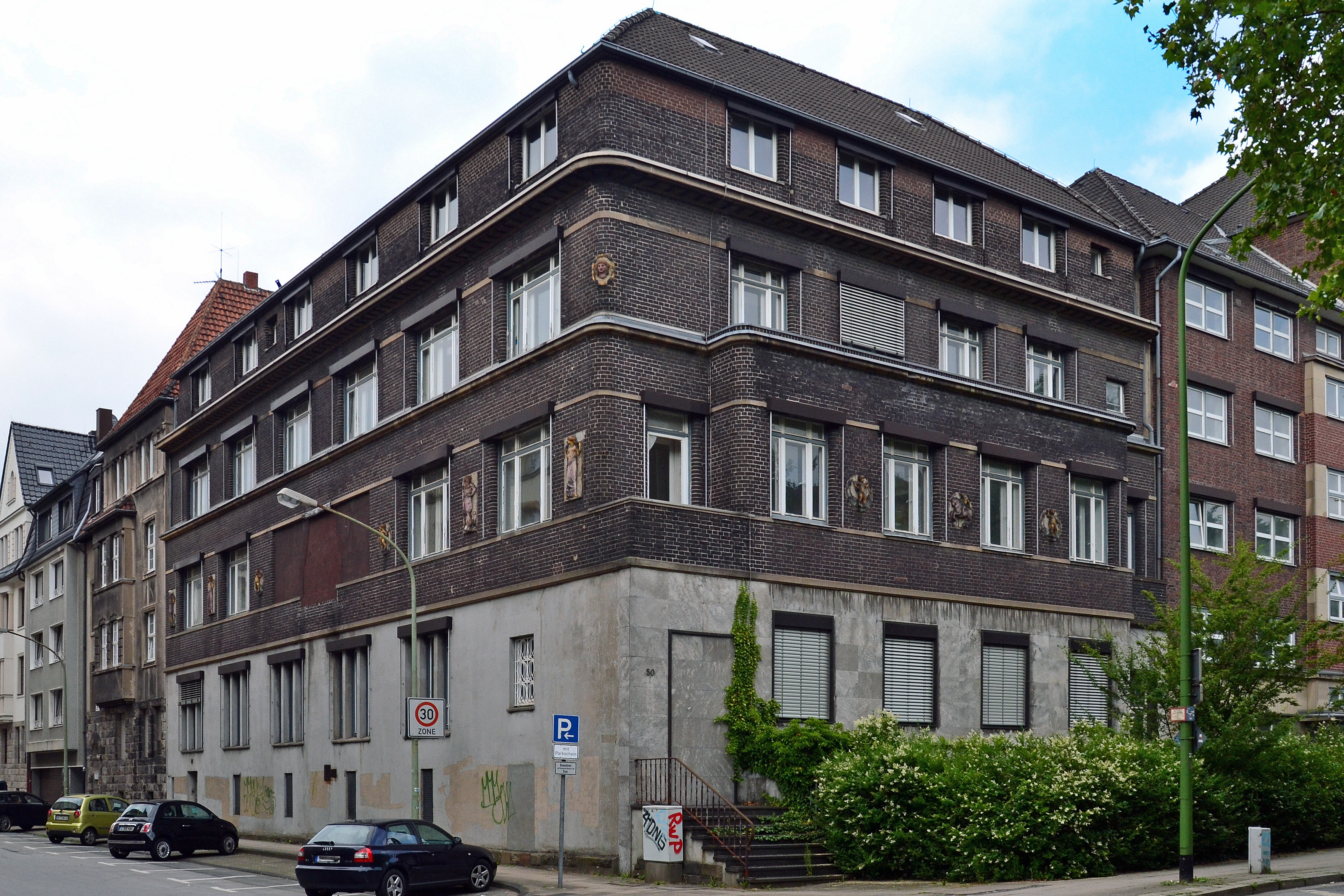 Ehemalige Staatsanwaltschaft Essen in Essen-Rüttenscheid, fertiggestellt 1914